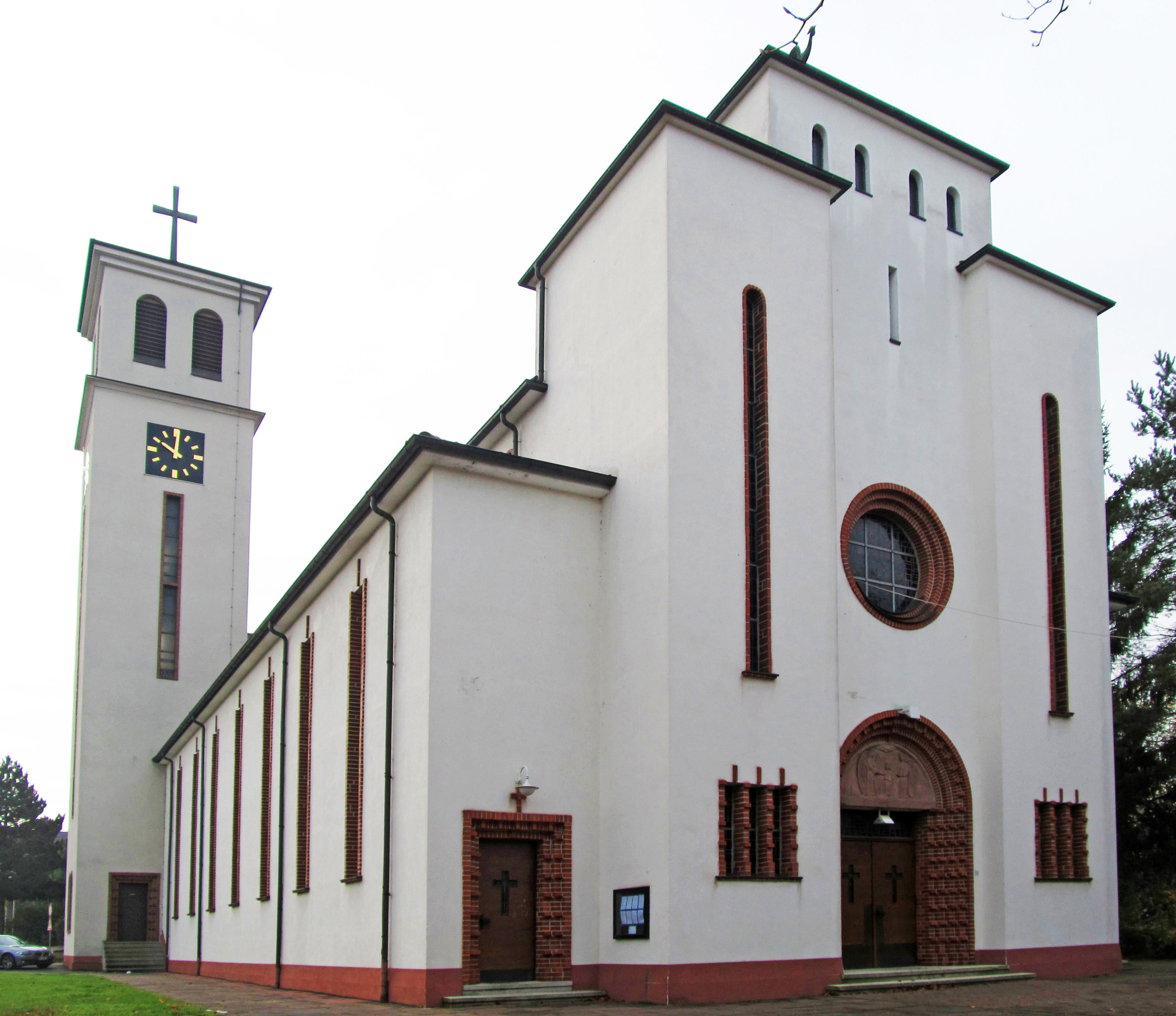 Die katholische Pfarrkirche „Zu den heiligen Schutzengeln“ in Schaffhausen, einem Ortsteil der Gemeinde Wadgassen, Saarland